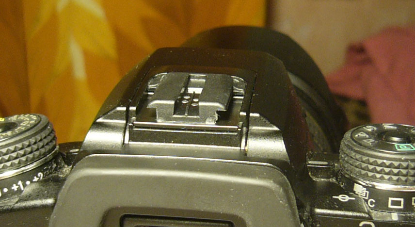 Konica Minolta Dynax/Maxxum 7D hot shoe